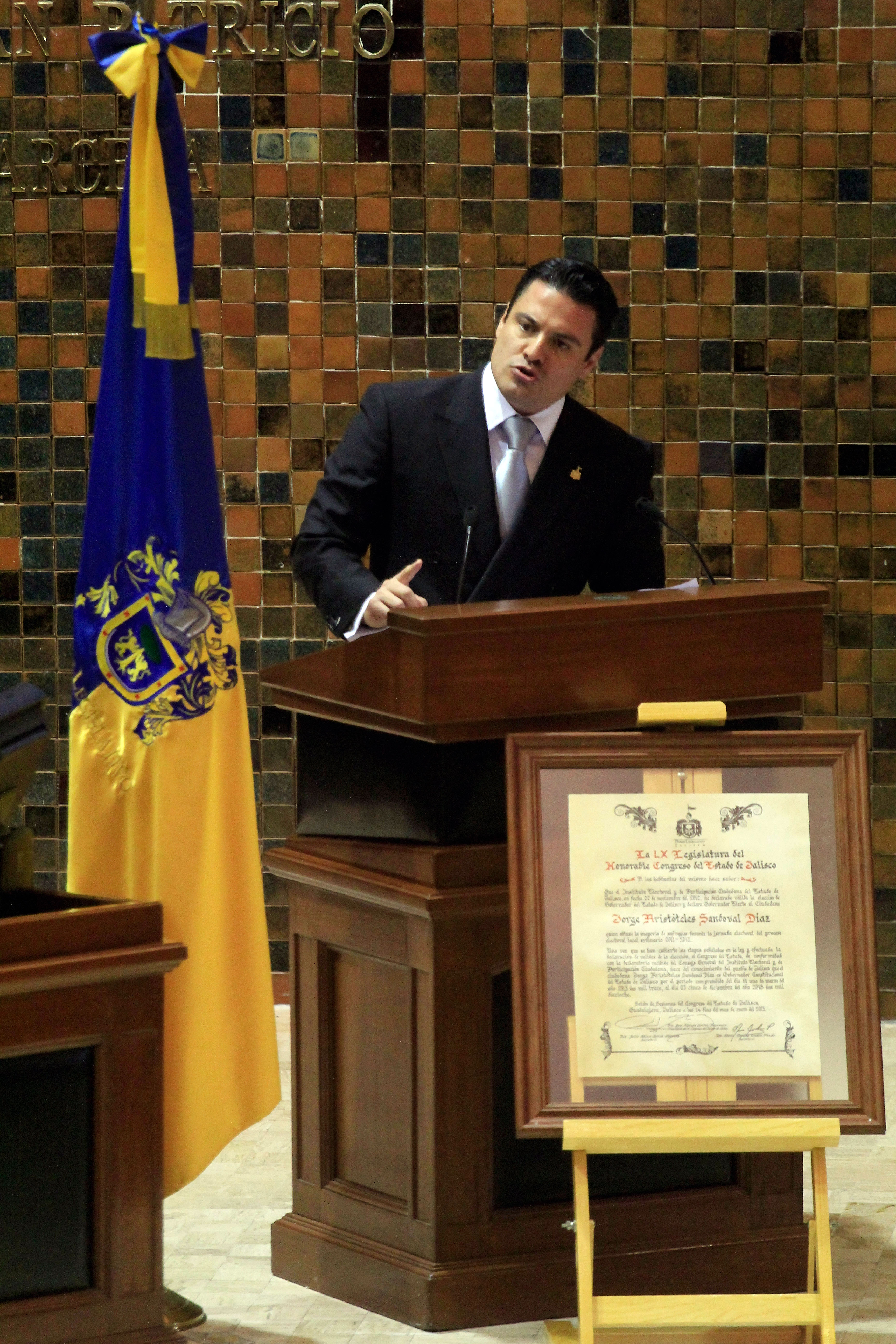 01-03-2013 toma de protesta